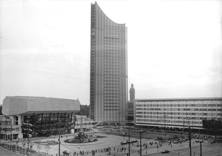 ADN-ZB Grubitzsch 5.9.82 Leipzig: Blick auf den Karl-Marx-Platz der Handelsmetropole mit der Karl-Marx-Universität (Mitte, rechts) und dem neuen Gewandhaus (links). Domizil des weltberühmten Gewandhausorchesters.